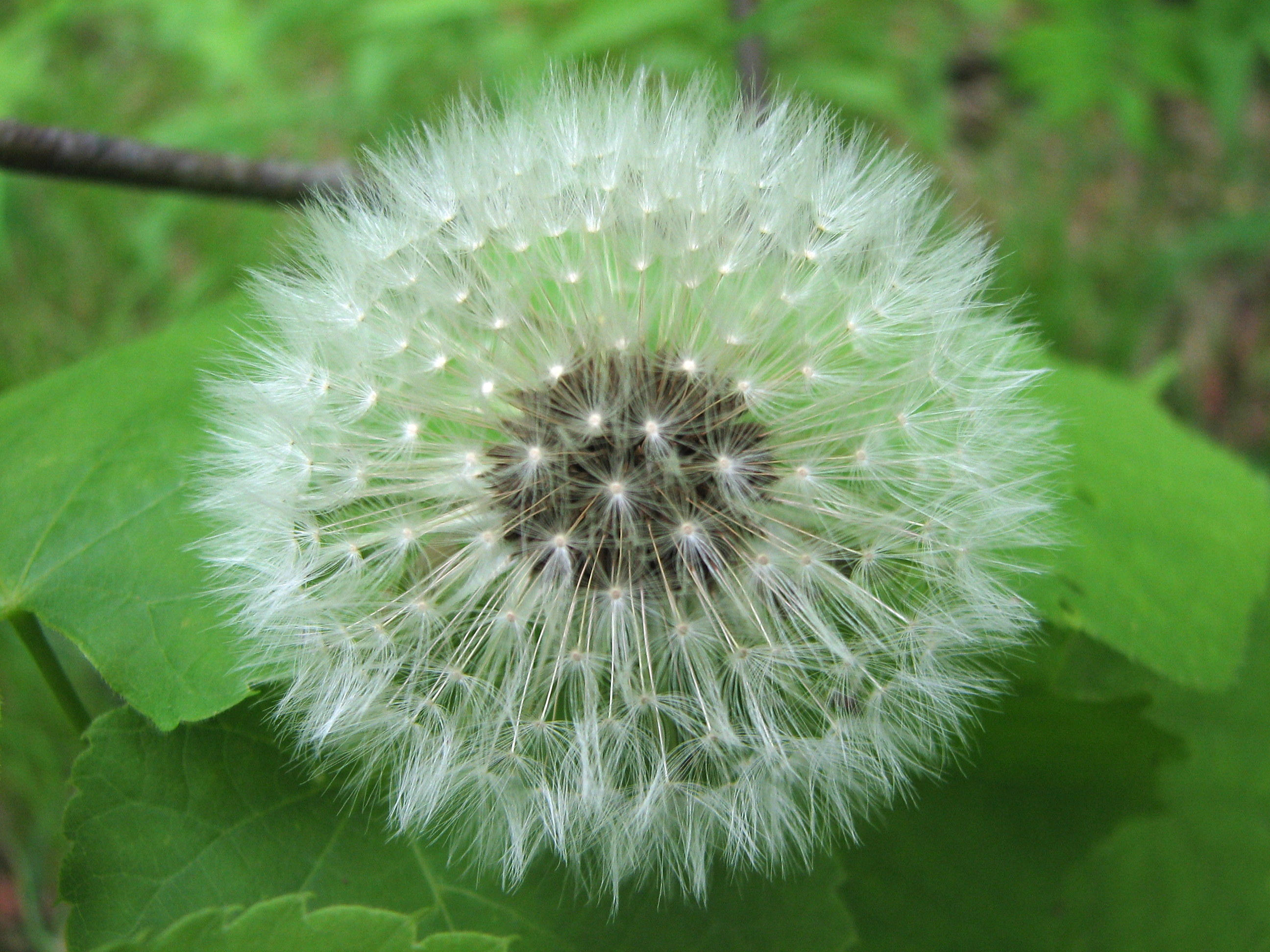 A dandelion clock